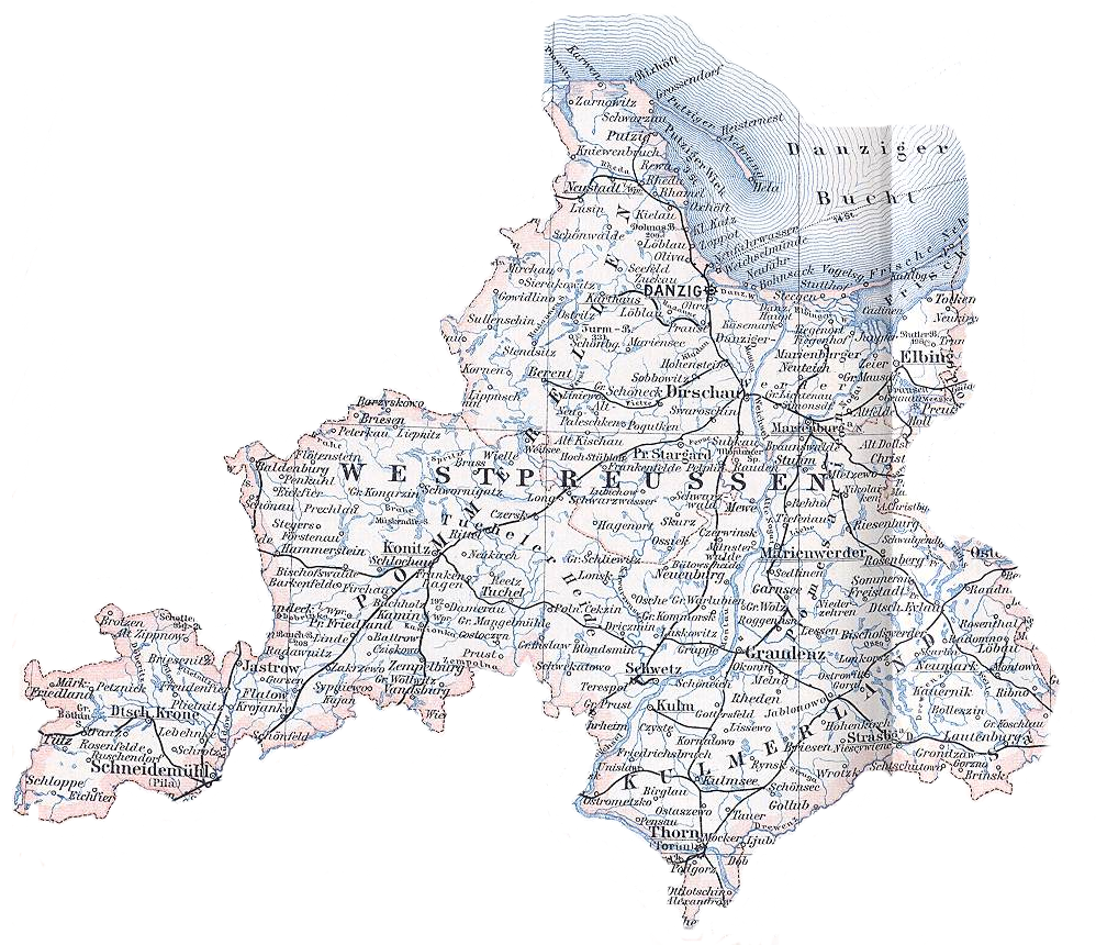 Westpreußen